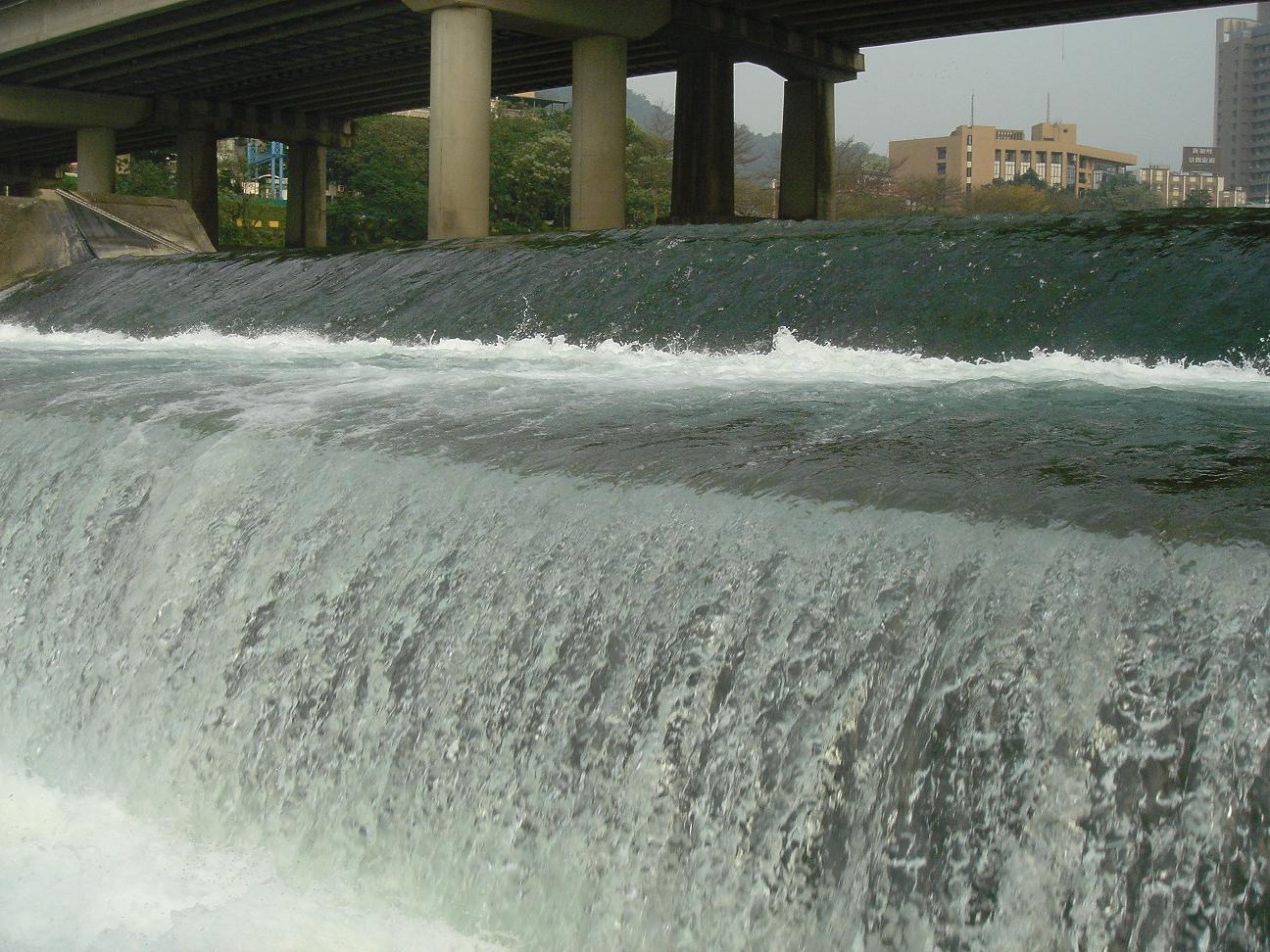 中文（台灣）: 台北縣新店市的碧潭攔河堰